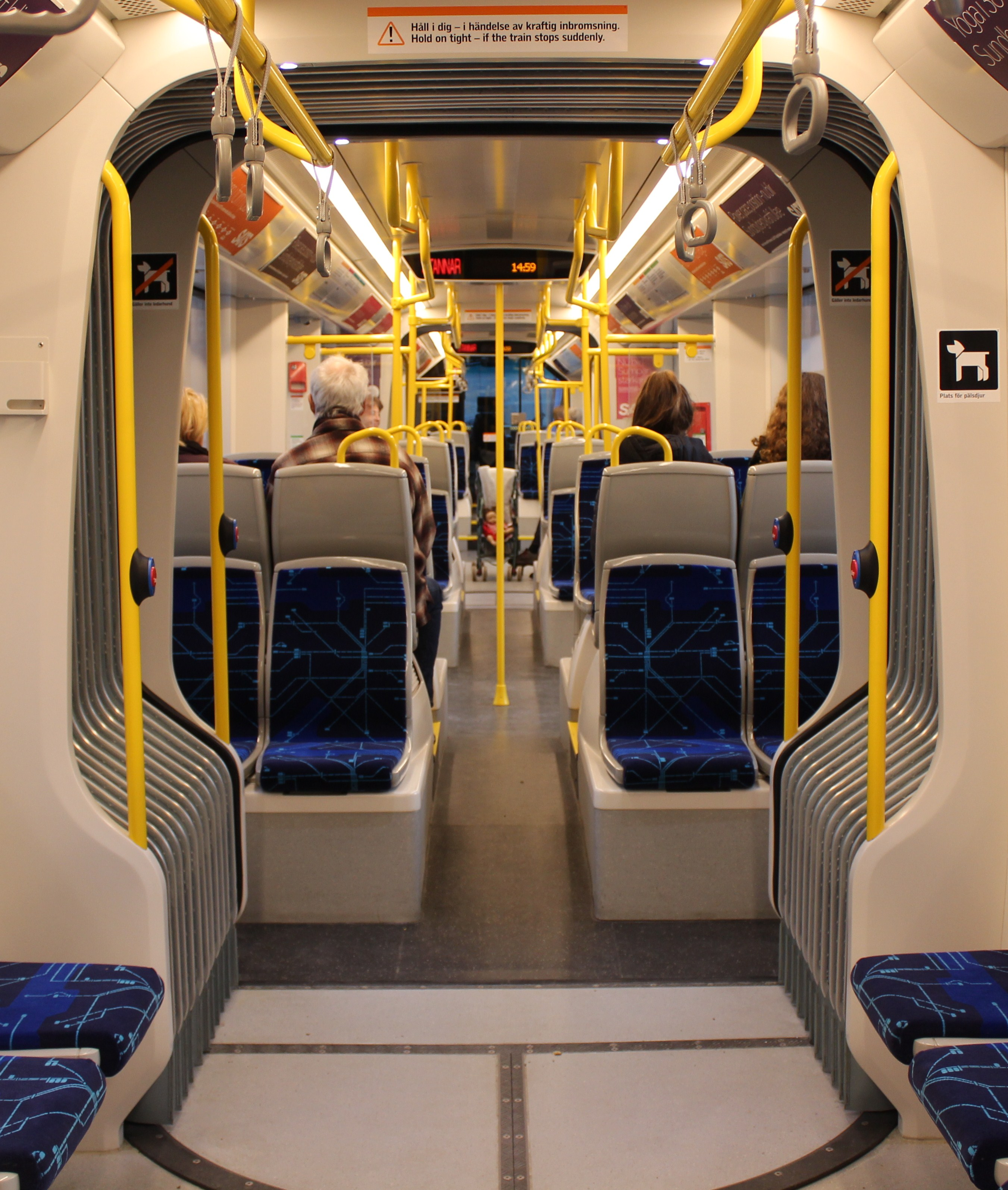 Vagnen inifrån, Tvärbanan mellan Sundbyberg och Solna november 2013